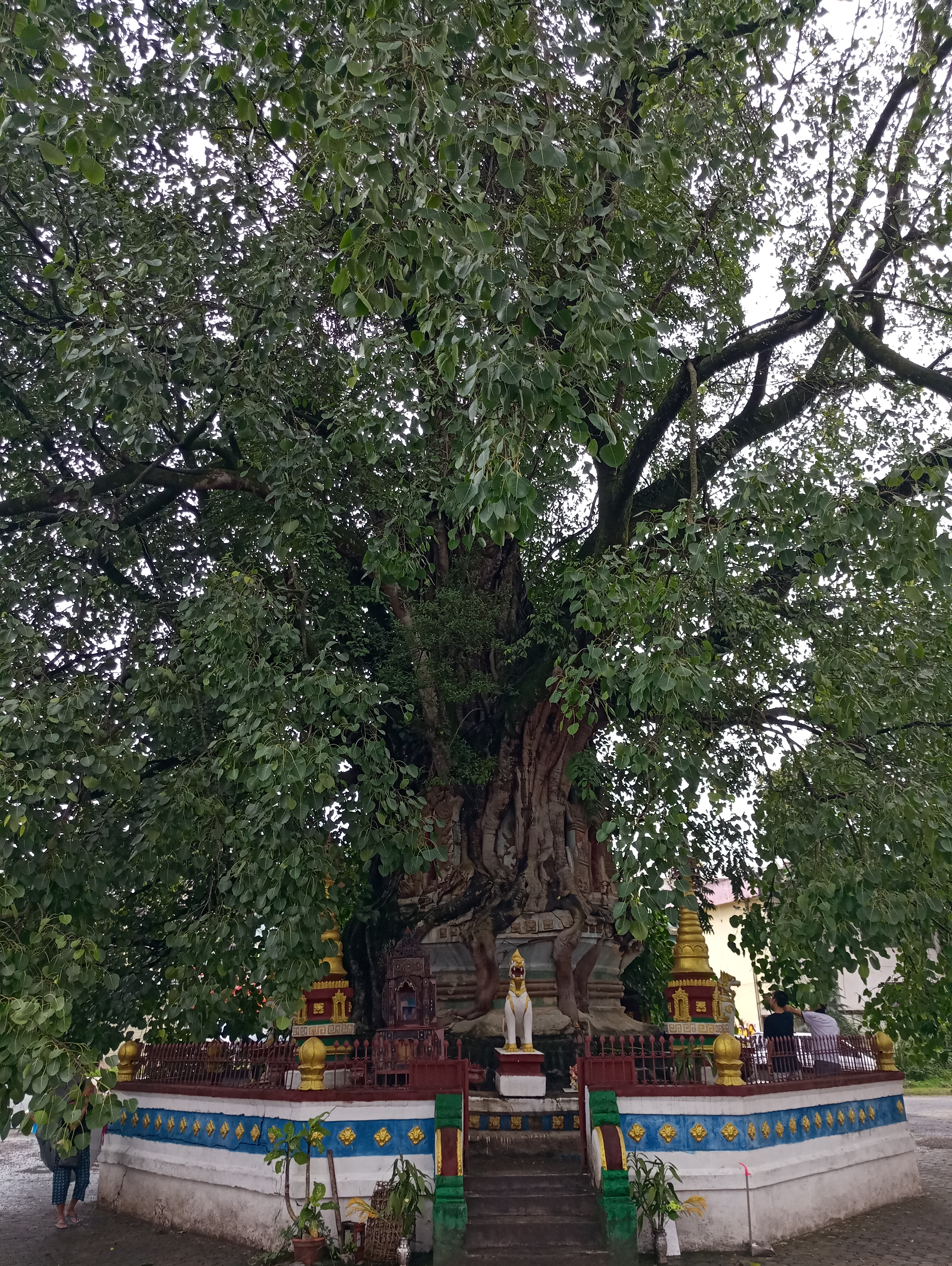 芒市铁城佛塔